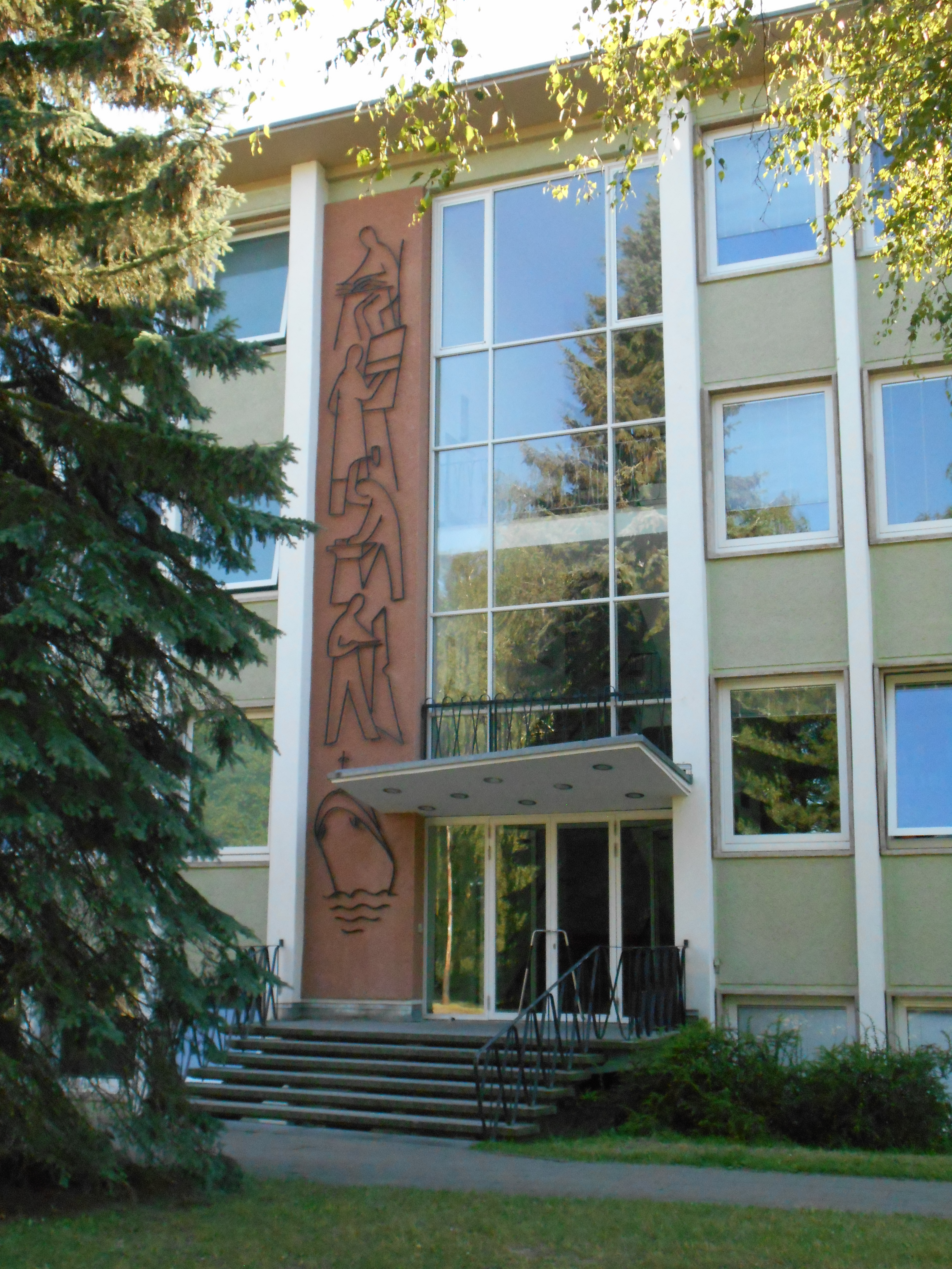 Treppenhaus des Verwaltungsgebäudes der Schiffbautechnischen Fakultät Rostock